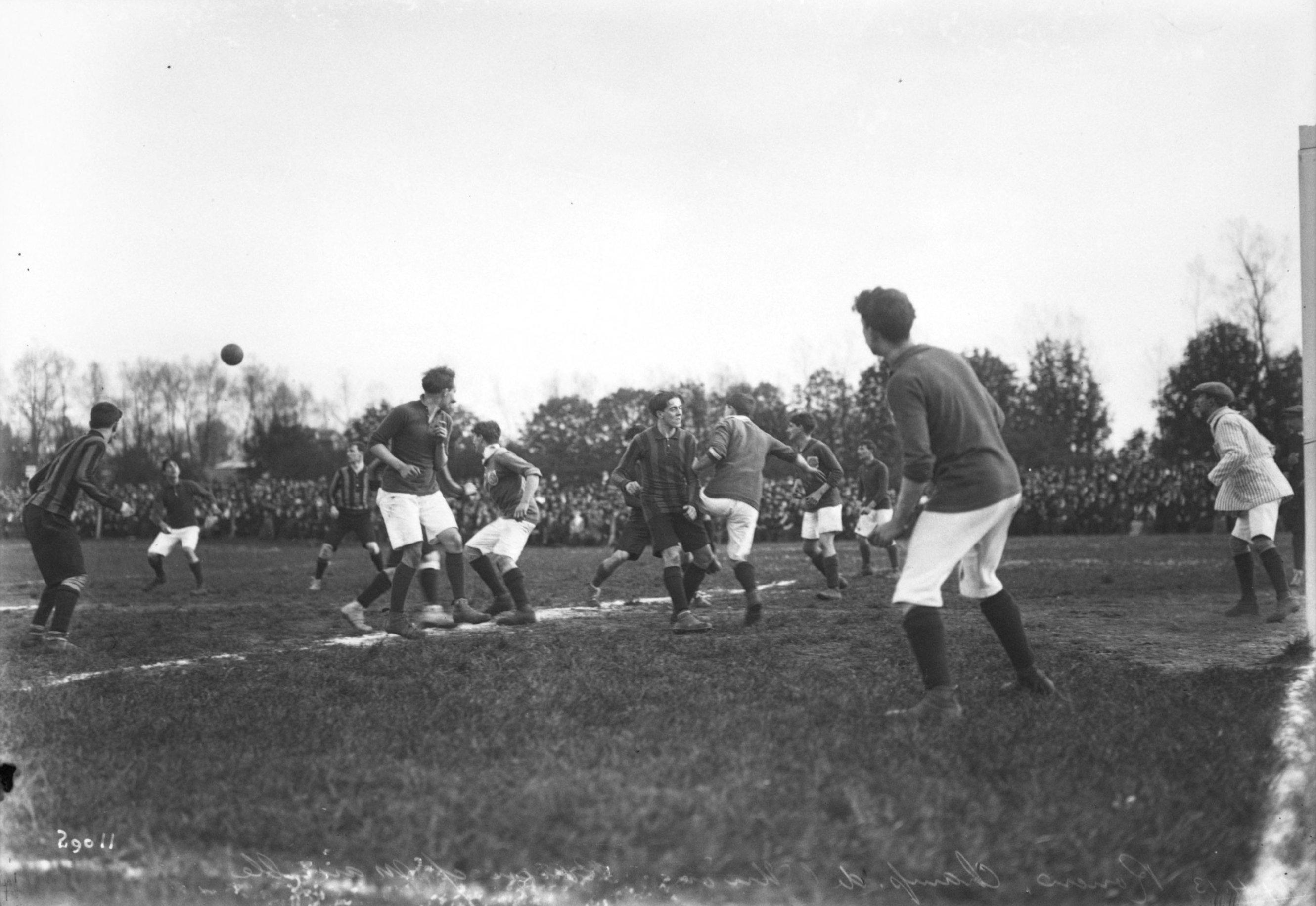 Photo de la finale du championnat de l'U.S.F.S.A de football entre le FC Rouen et le SH Marseille.